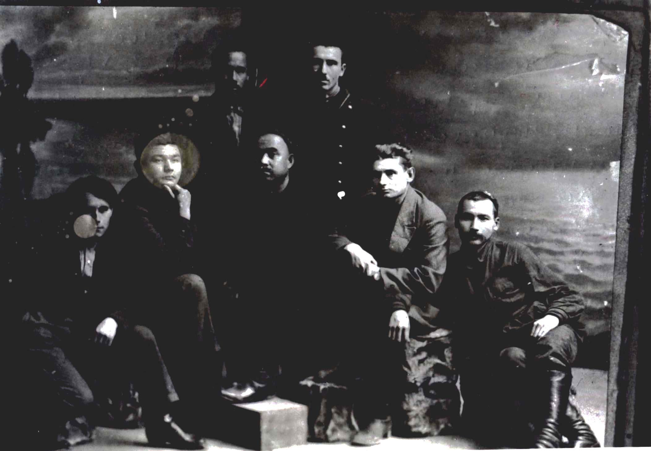 члены движения "Узбекбирлашув". Ташкент 1927 год